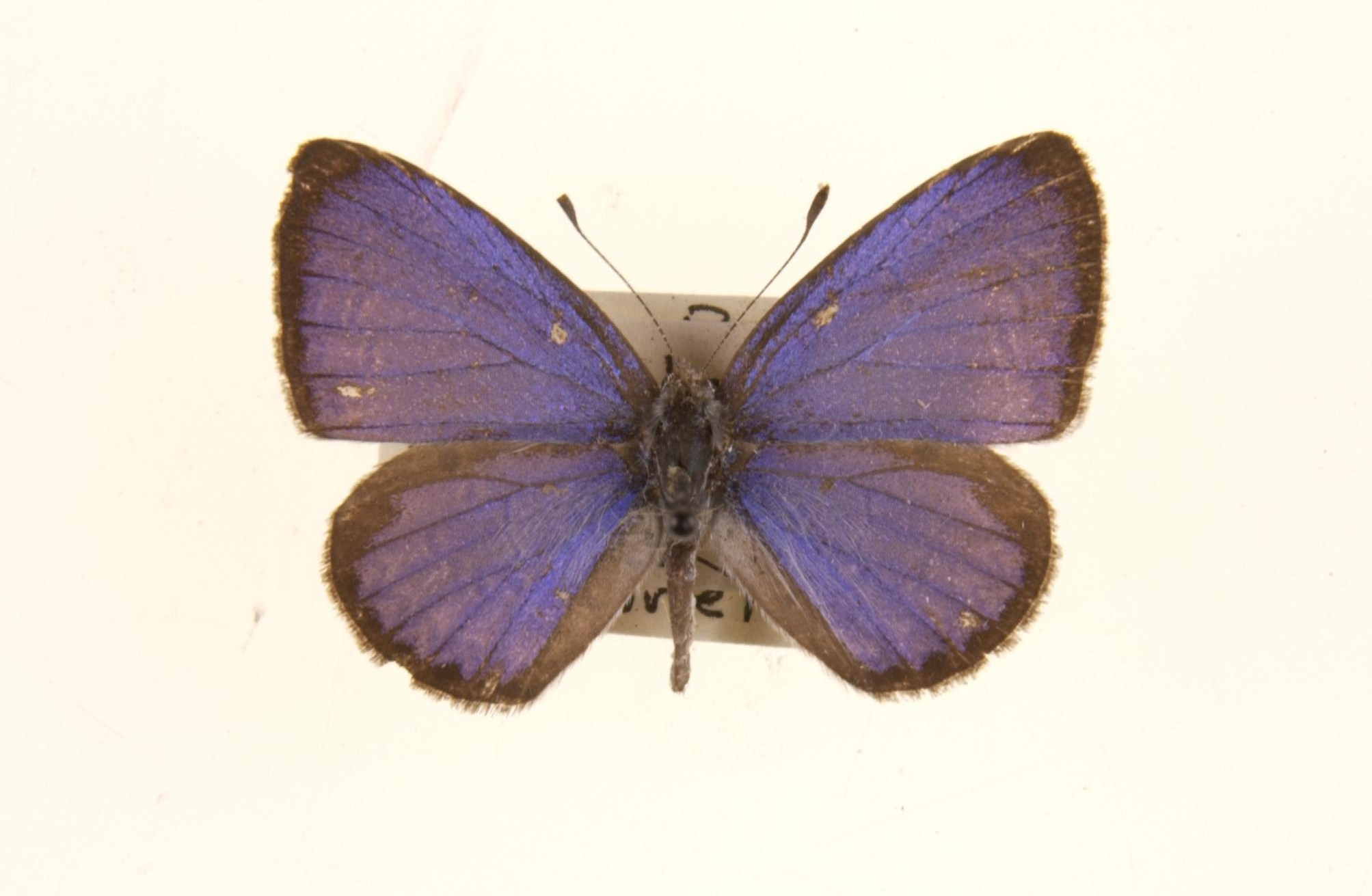 puspa male